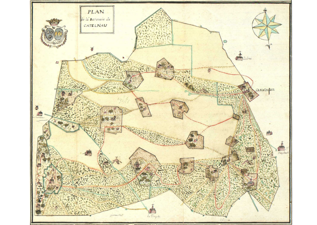 Recueil Jean-Baptiste Fouquet : Mémoires imprimés et manuscrits sur des projets de défrichements, assèchements de marais, et construction de canaux dans les Landes de Gascogne. Plan de Castelnau-Médoc, 1776, Desbiey.